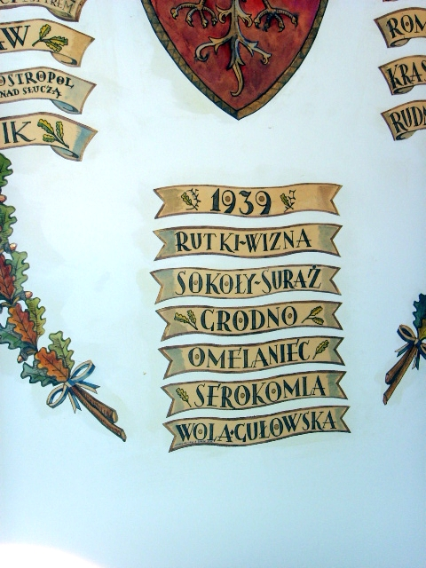 Sufit w sali 2 pułku ułanów grochowskich Instytutu im. Sikorskiego w Londynie